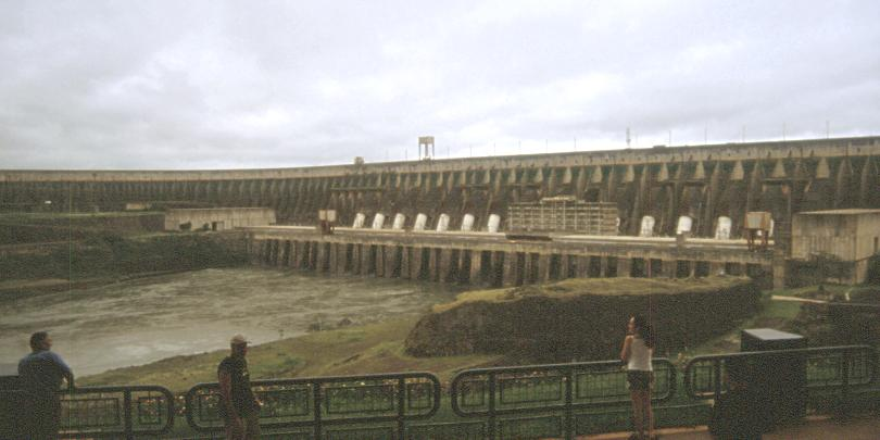 Itaipu, Staumauer